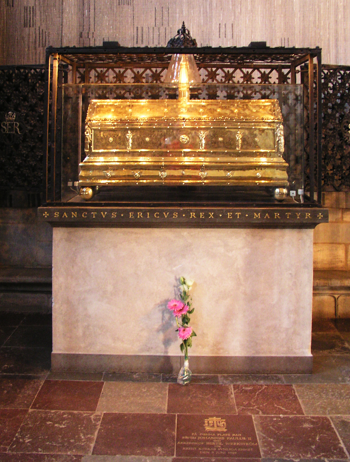 Uppsala domkyrka / Uppsala cathedral. Grave of Saint Erik